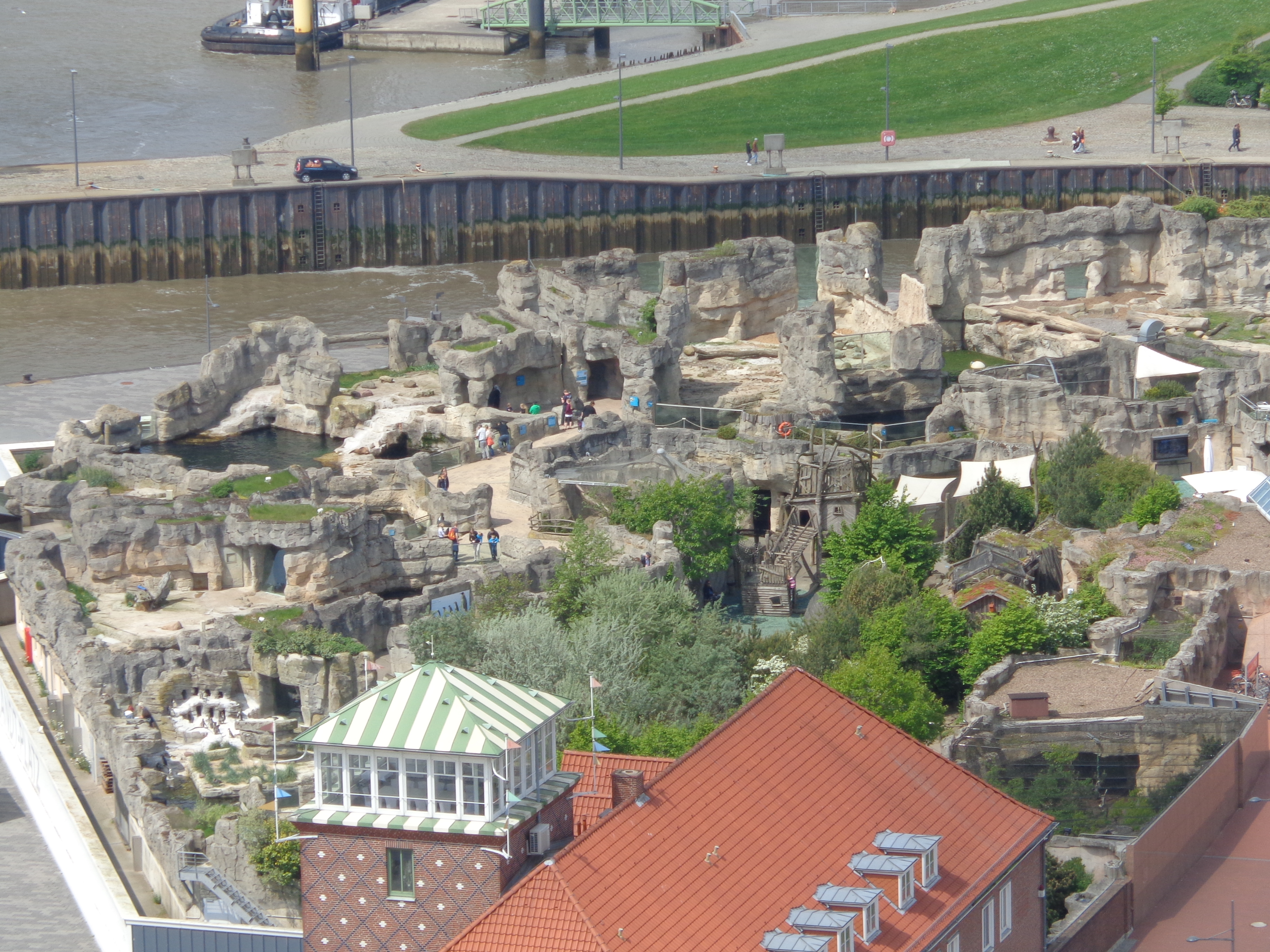 Zoo am Meer in Bremerhaven, im Vordergrund die Strandhalle (Bremerhaven)